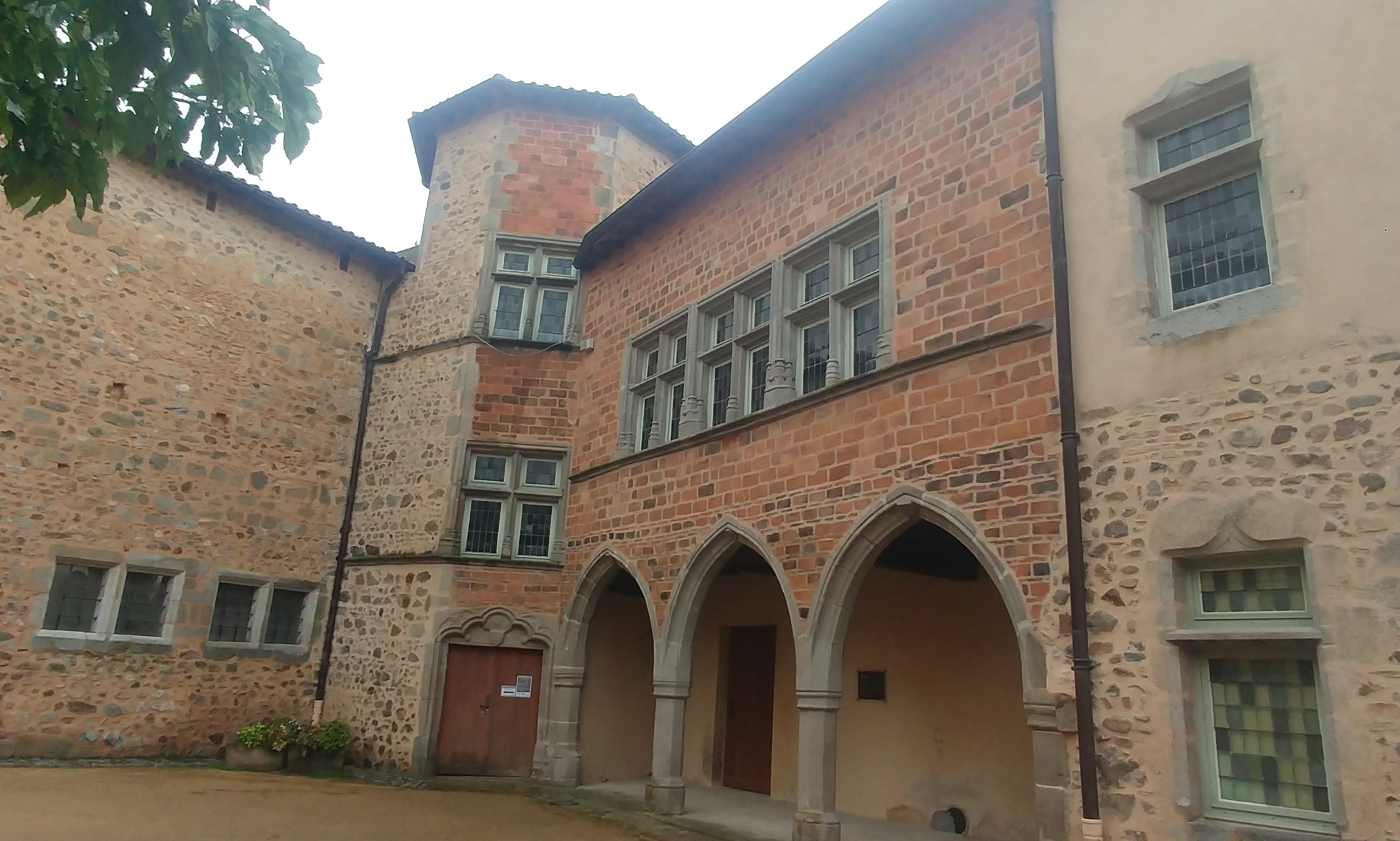 Logis du Prieur de Pommiers, donnant sur la place de l'église. La façade en briques date du XVe siècle.